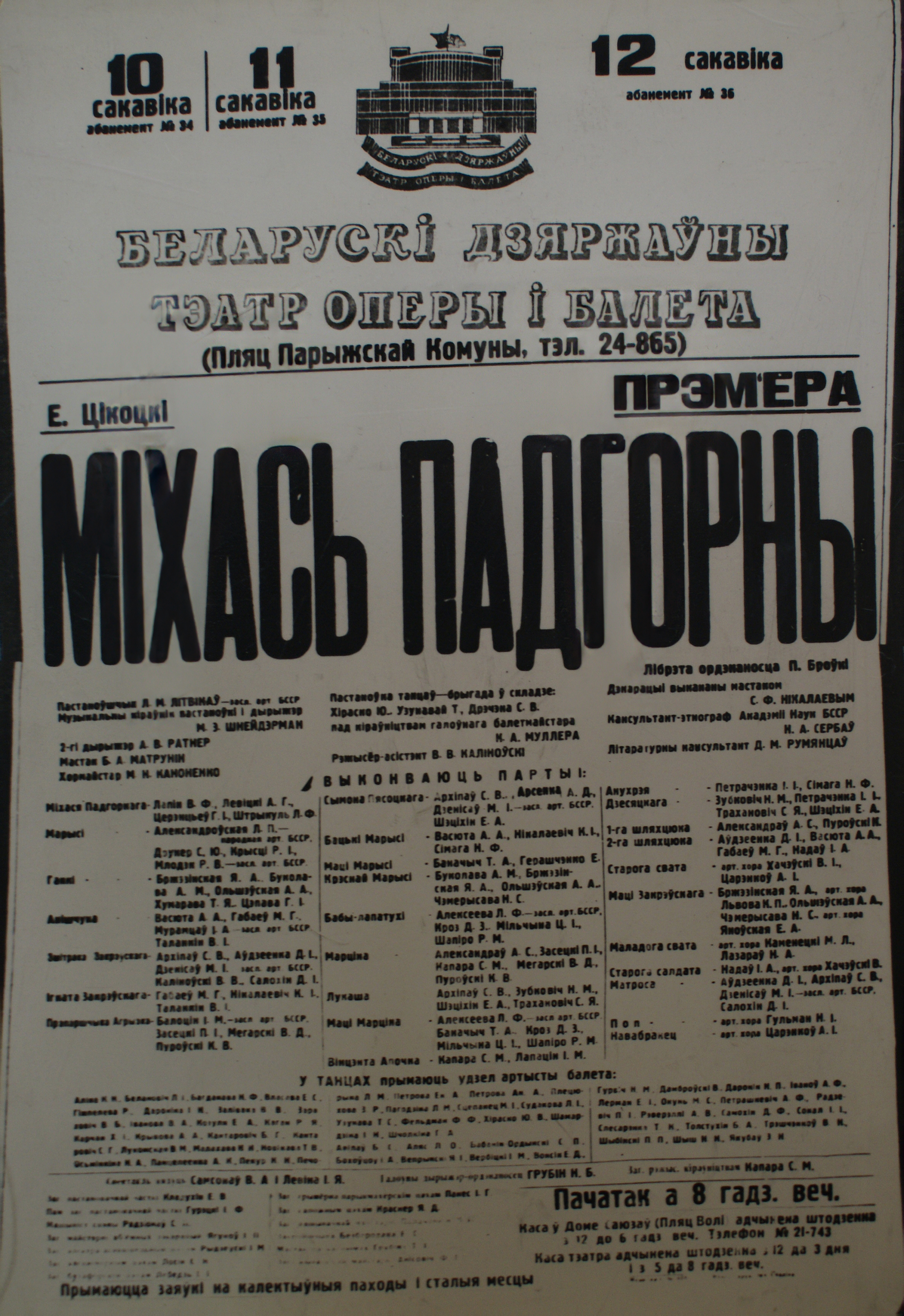 Дзяржаўны музей гісторыі тэатральнай і музычнай культуры Рэспублікі Беларусь